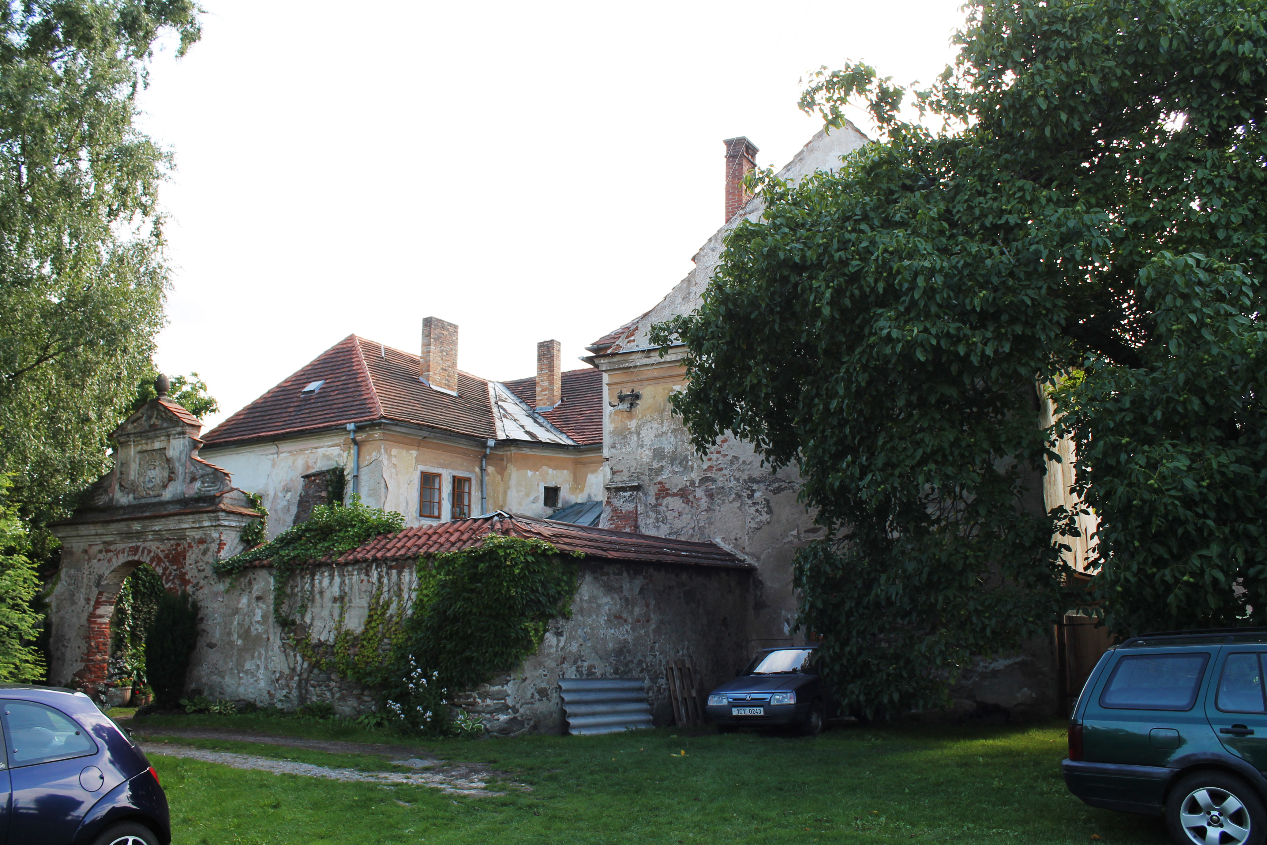 Zámek - zámeček Sedlice, Sedlice